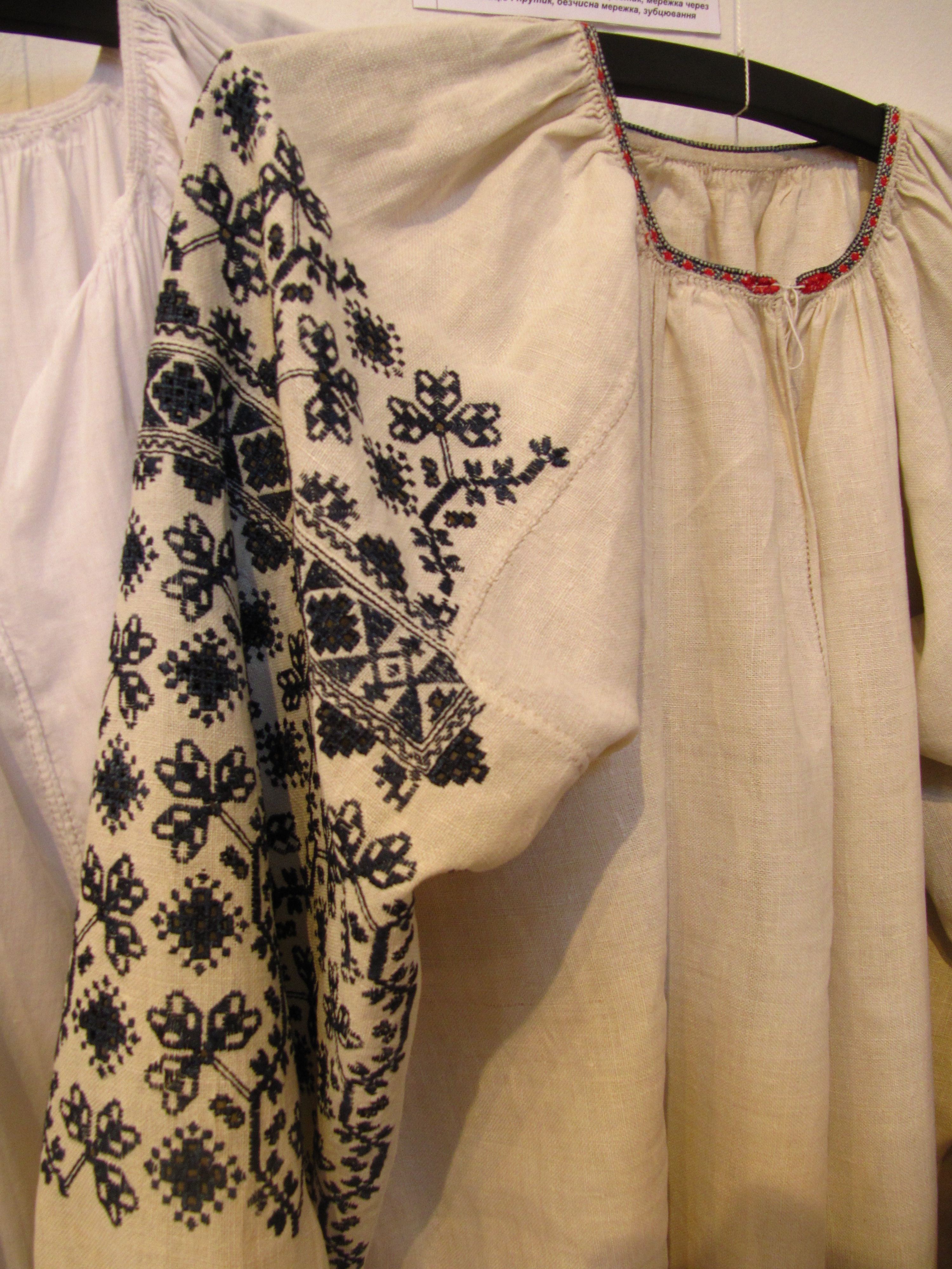 Жіноча додільна сорочка. Поч. 20 ст. Полтавська обл. Гадяцький р. Виставка в музеї Івана Гончара (Київ).